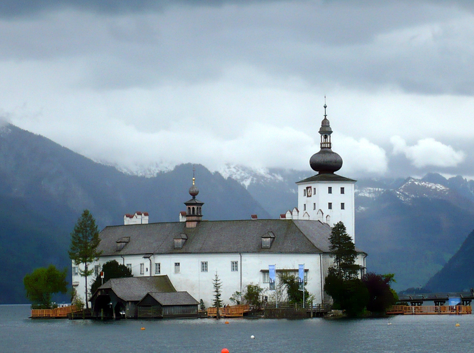 Gmunden